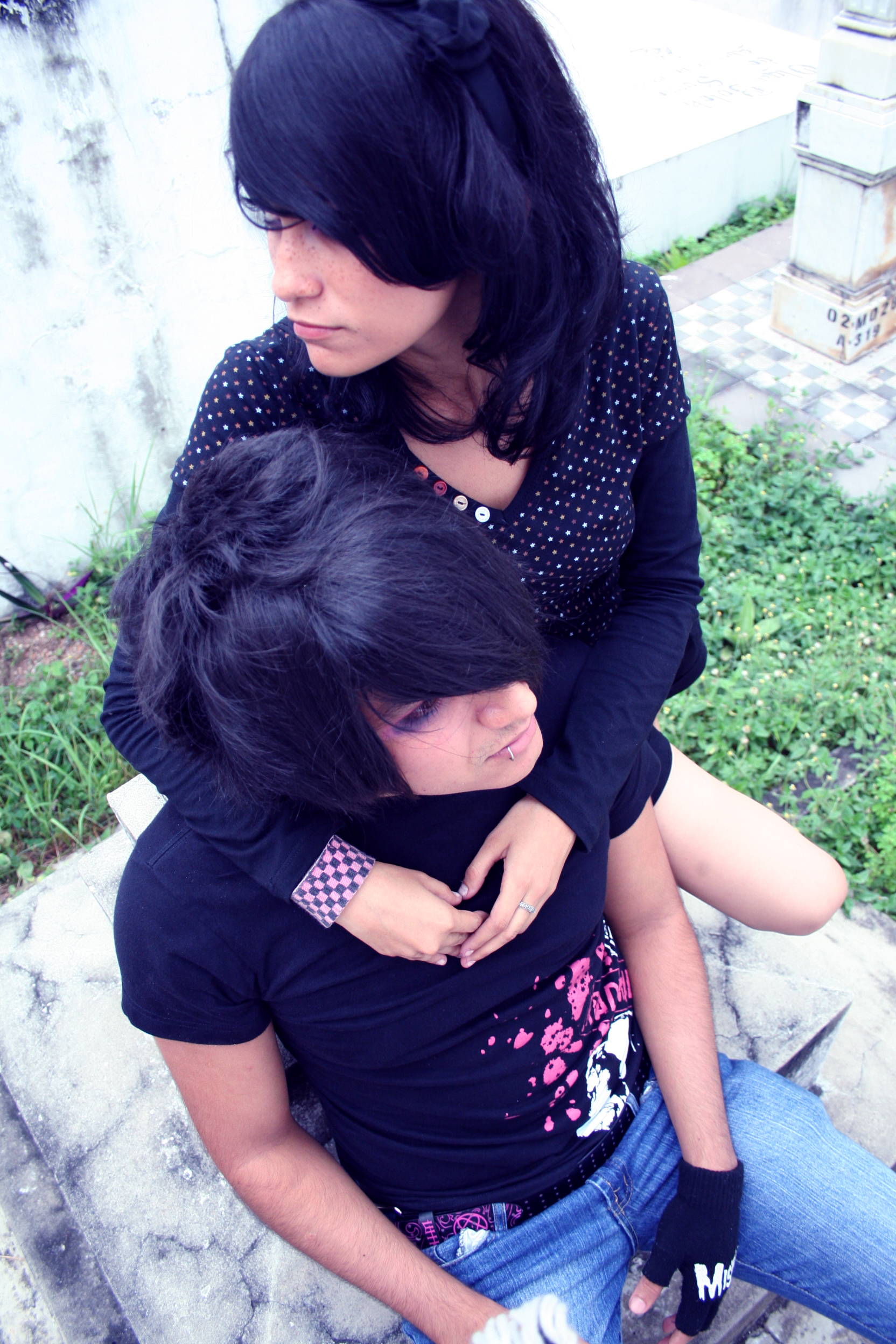 Emo boy and Girl; Emoluv; Emolove; Male Model: Arturo Pozo